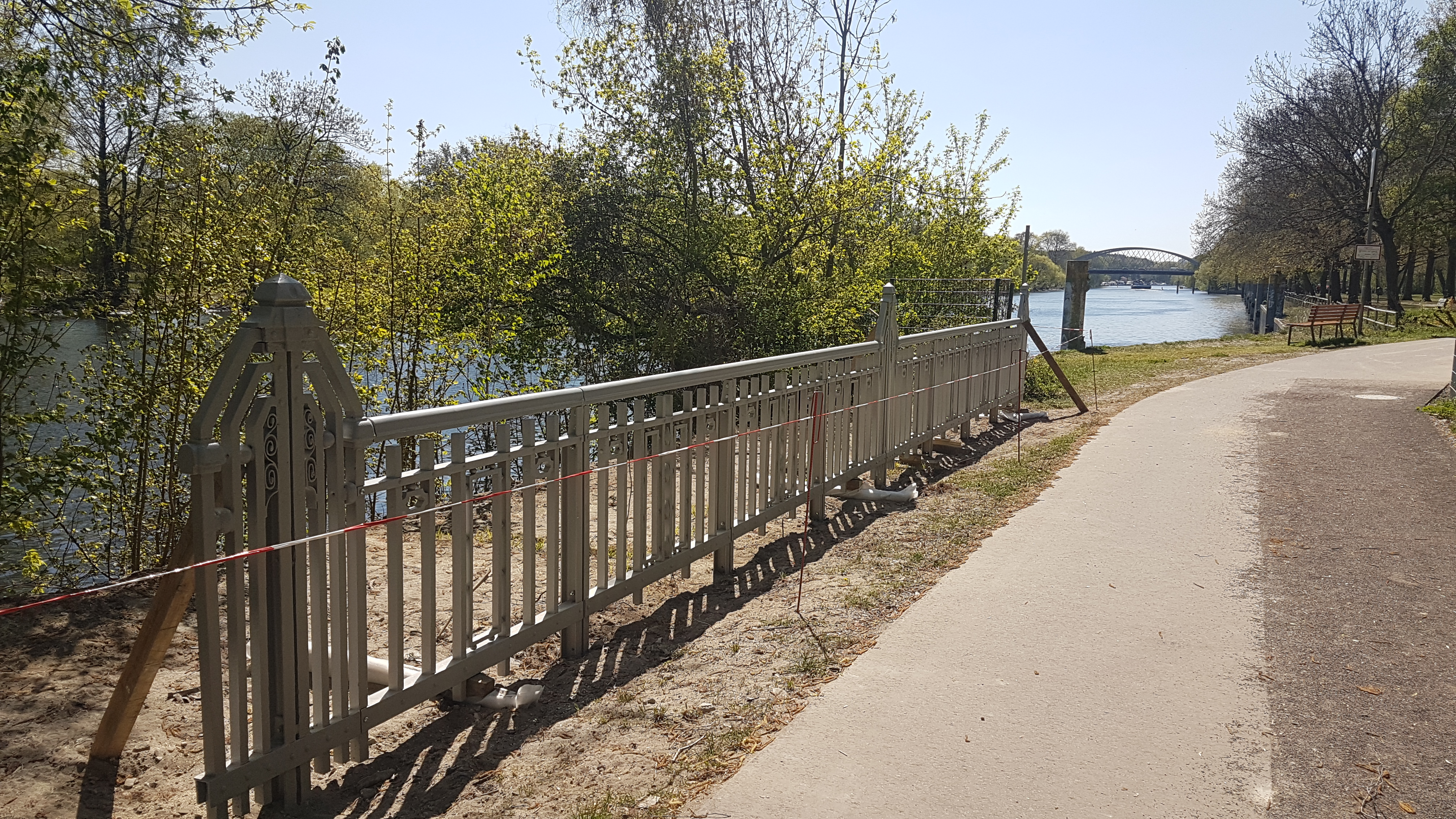 Das ehemalige Geländer der alten Freybrücke wird 2020 zur Ufersicherung im Grimitzpark verwendet. Im Hintergrund die neue Freybrücke